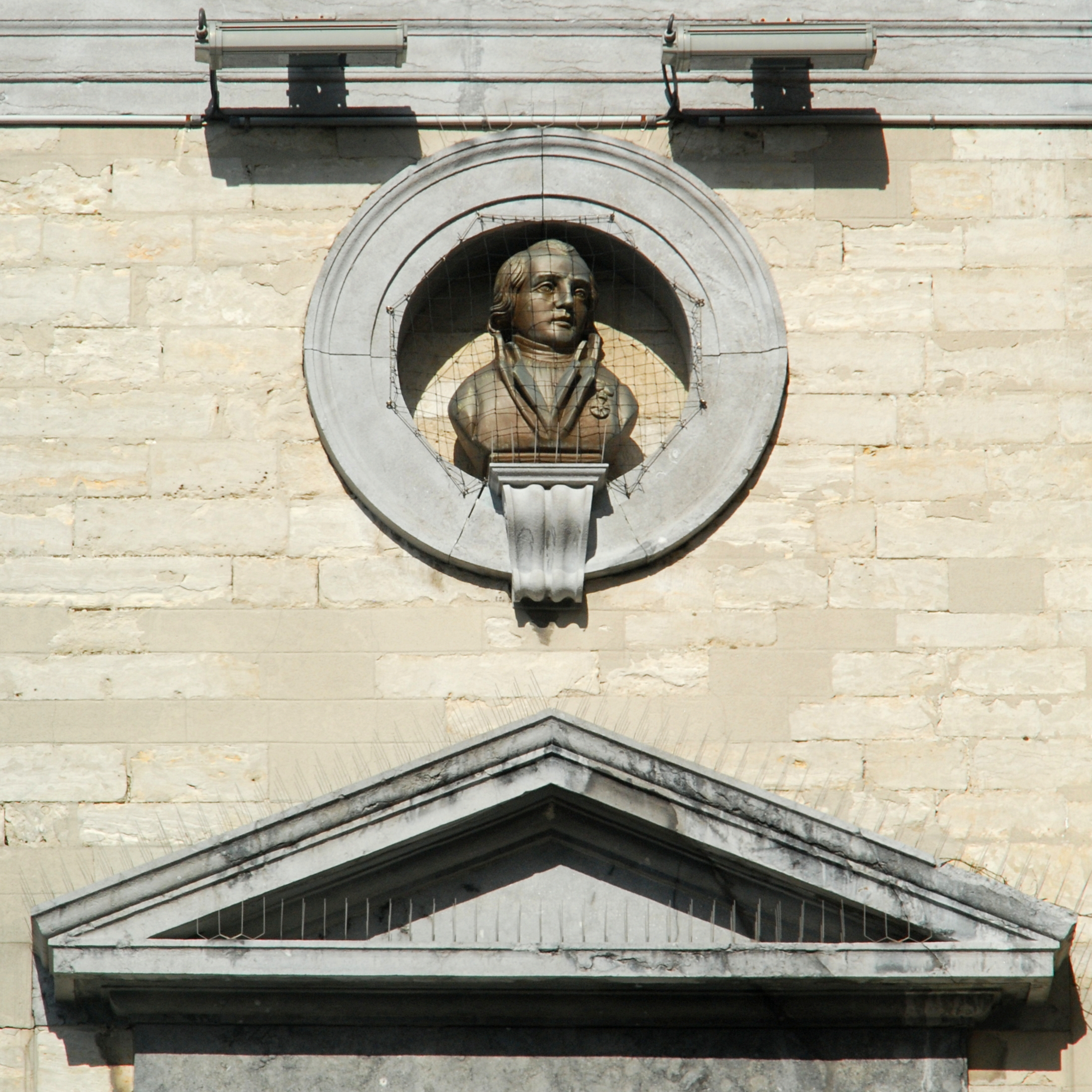 Belgique - Brabant flamand - Tirlemont (Tienen) - Hôtel de ville